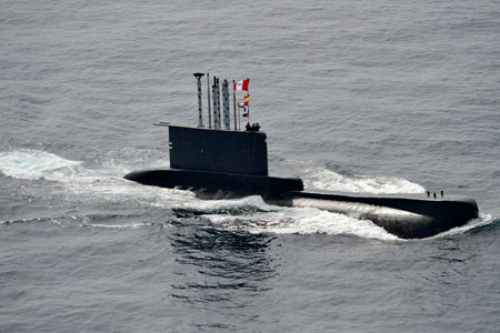 Submarino en superficie